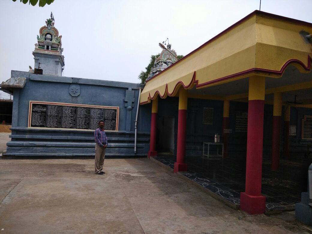 சிருங்காண்டீஸ்வரர் ஆலய வளாகம்